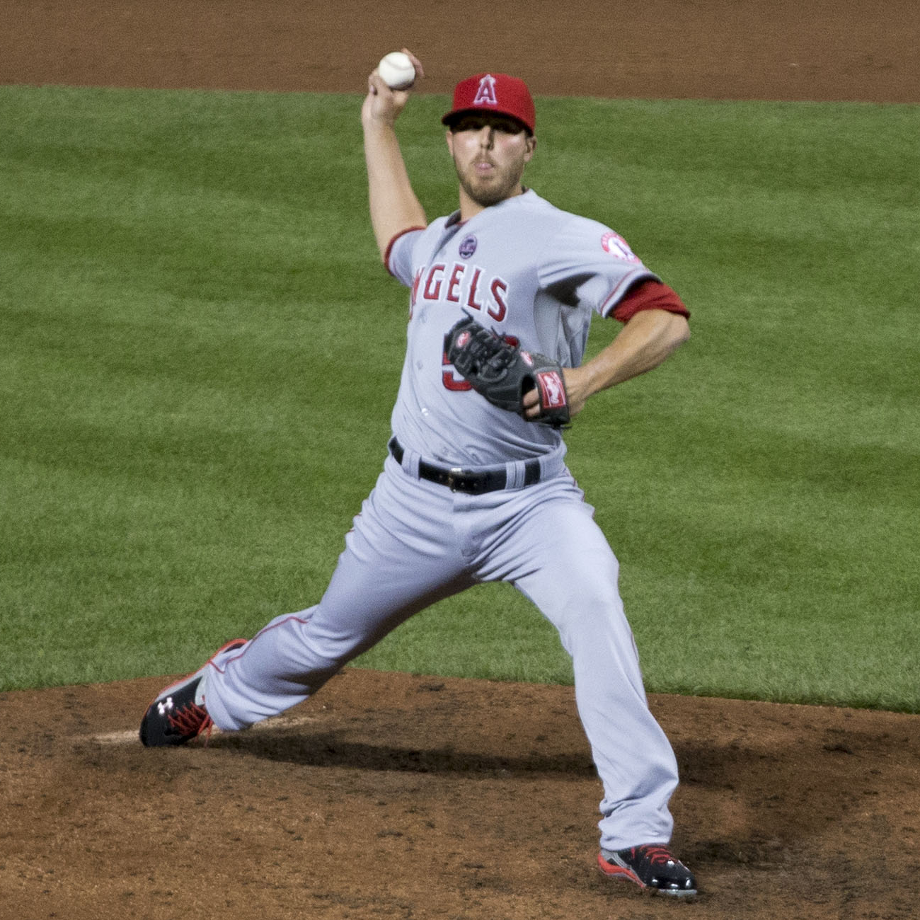 Michael Kohn